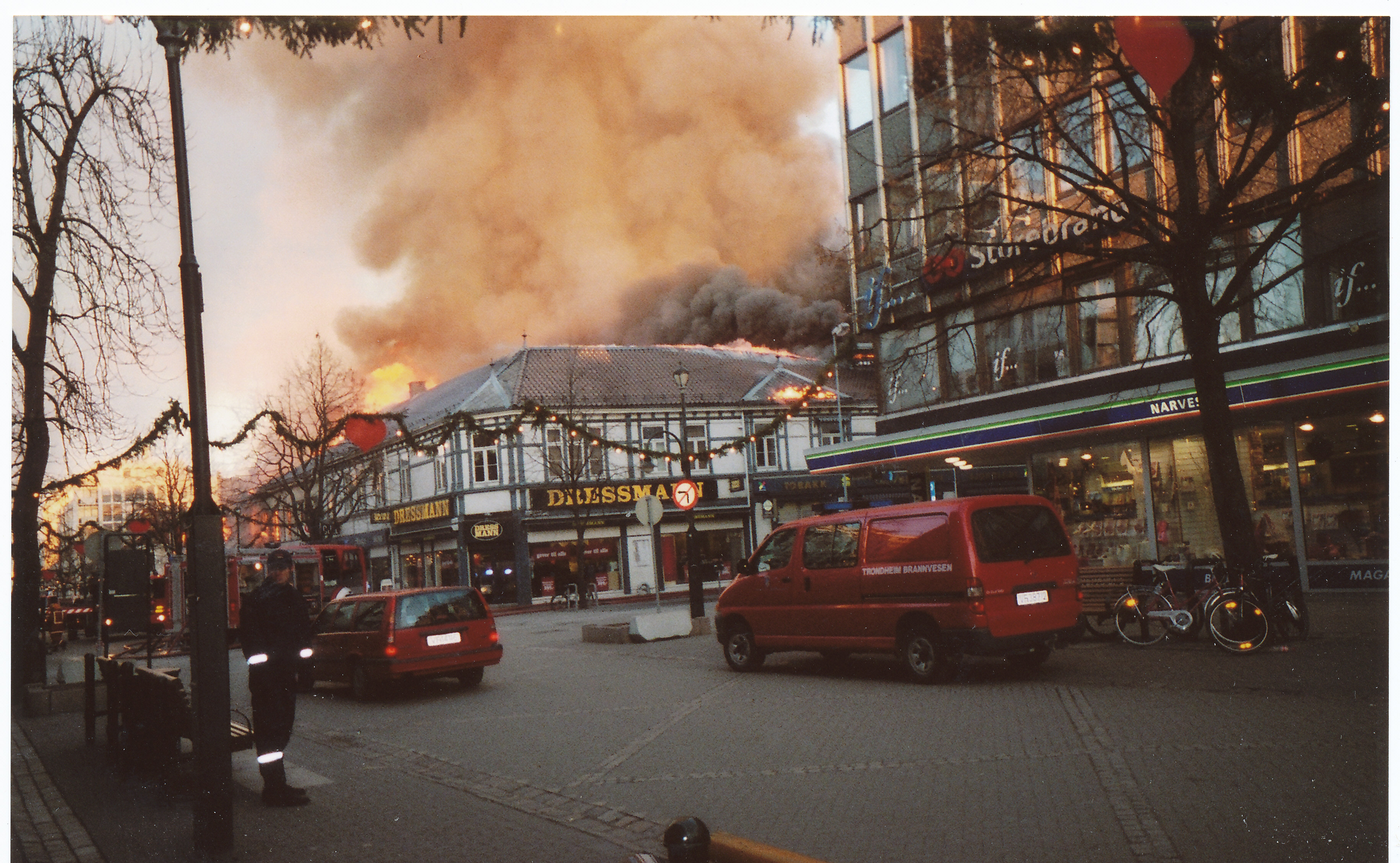 Format: Fotopositiv Dato / Date: Lørdag 7 Desember 2002 Fotograf / Photographer: Haldis Isachsen Sted / Place: Nordre gate, Trondheim Eier / Owner Institution: Trondheim byarkiv, The Municipal Archives of Trondheim Arkivreferanse / Archive reference: Tor.H40.B07.F0340 [T0847] Merknad: Dronningens gate 14 / hjørnet Nordre gate. Den 7. desember 2002 brant hele denne verneverdige rekka av toetasjers trebygninger ned. Gården huset bl a Simon Engen, Gullsmed Morken, Dressmann og Sørensen. I dag er det reist en ny forretningsgård på området.